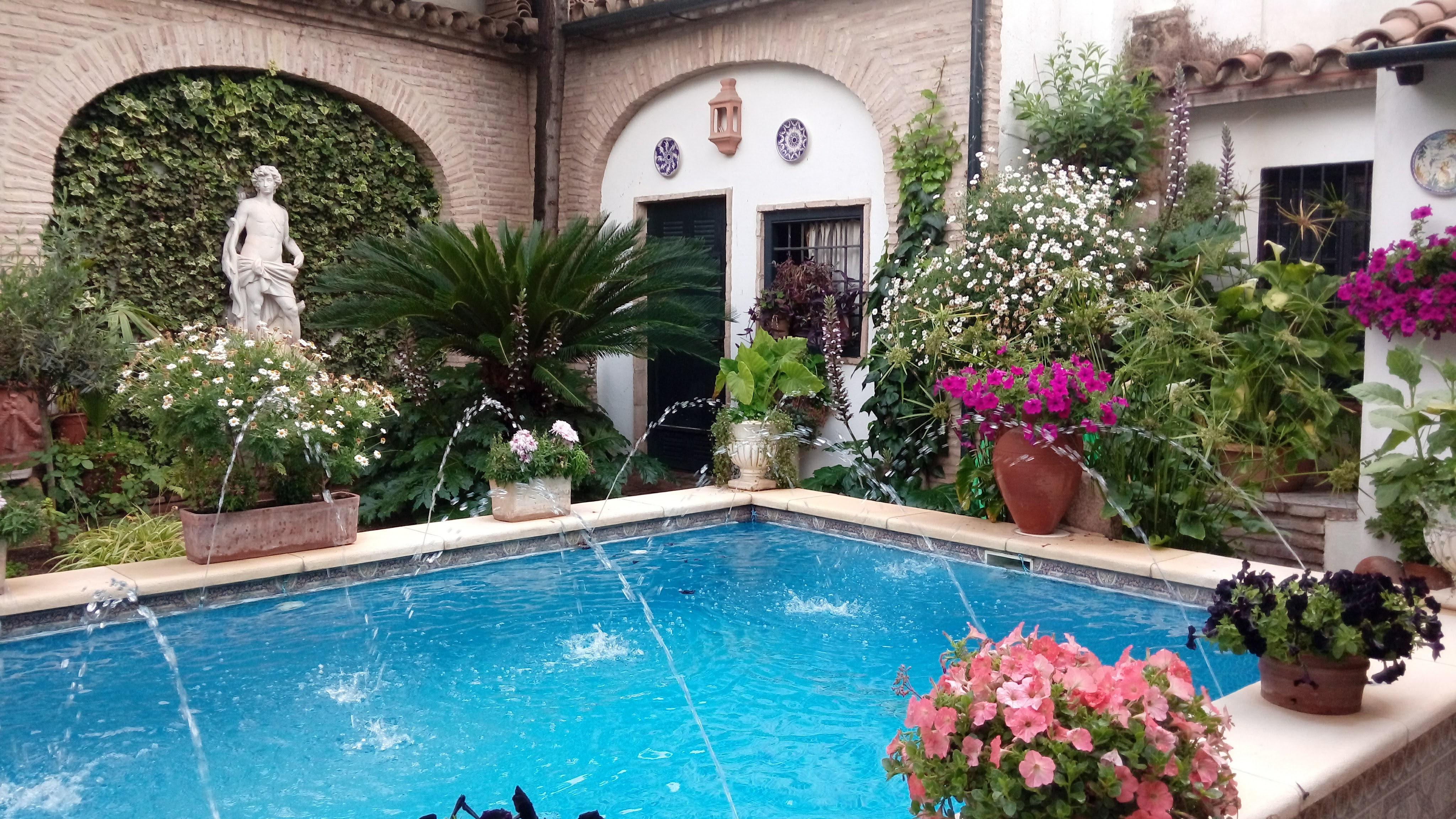 Córdoba. Patios de Córdoba